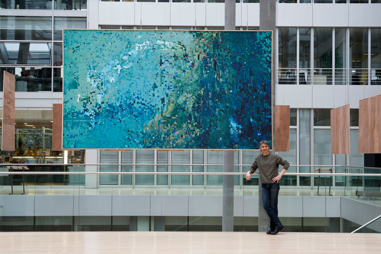 Ansgar Maria van Treeck vor Screenografie, Ausstellung im Haus der Ärzteschaft, Düsseldorf 2012